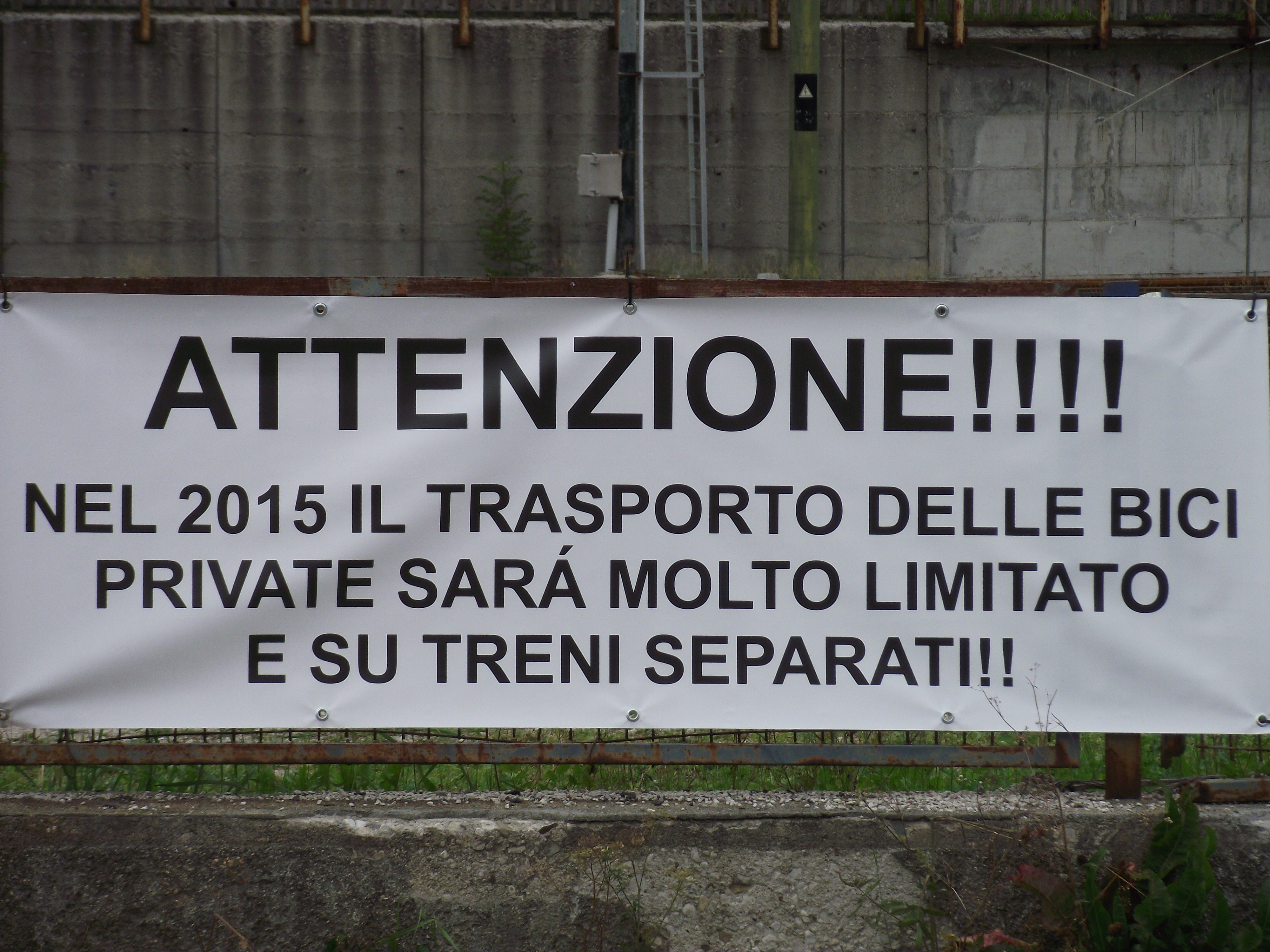 striscione alla stazione di san Candido annunciante il depotenziamento del trasporto biciclette sulla Lienz-San Candido